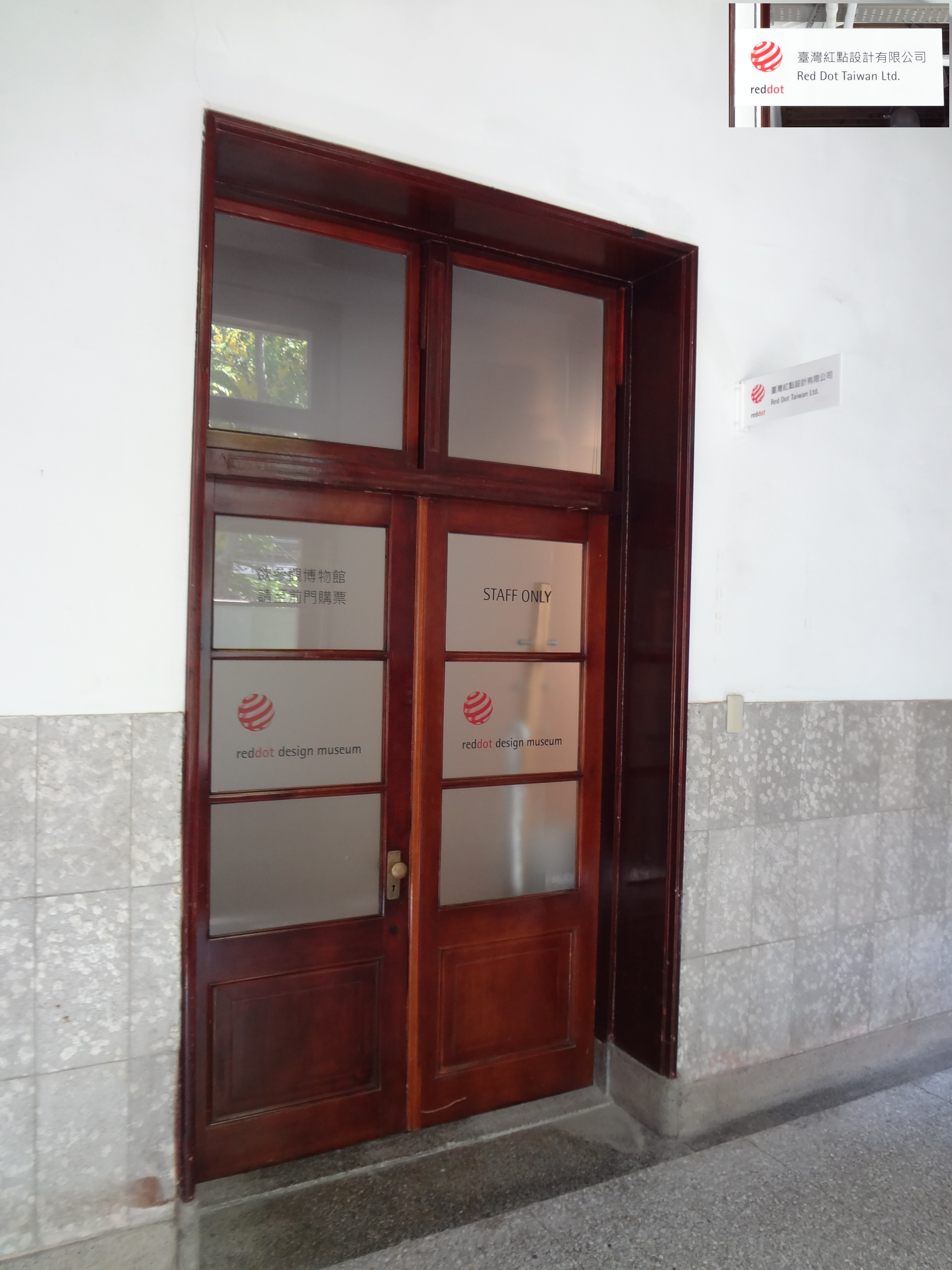 中文（台灣）: 臺灣紅點設計有限公司總部，位於臺北市松山文化創意園區1樓。